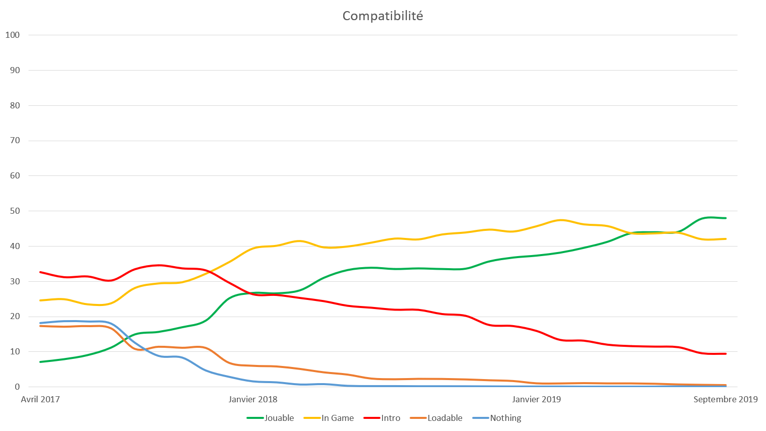 Graphique de l'évolution de la compatibilité jusqu'à septembre 2019